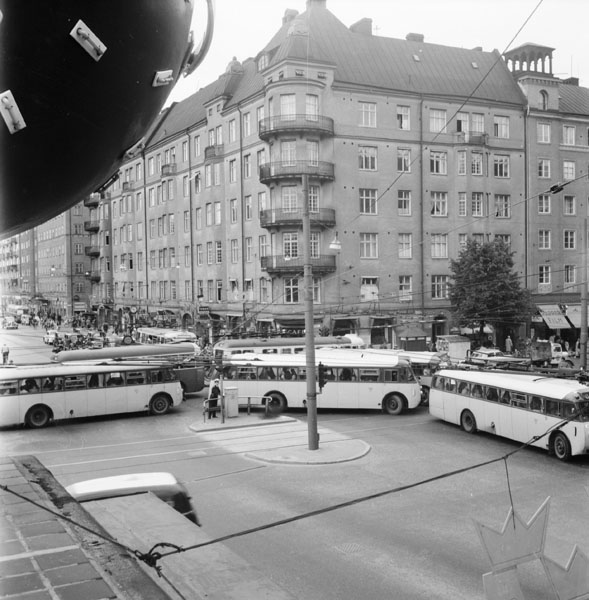 Flera bussar från Busstrafiken Stockholm-Södertörn och en SS-buss med släp vid Skanstull i Stockholm. I förgrunden, i övre vänstra hörnet, syns Åhlen & Holms (nuvarande Åhlens) berömda klocka.